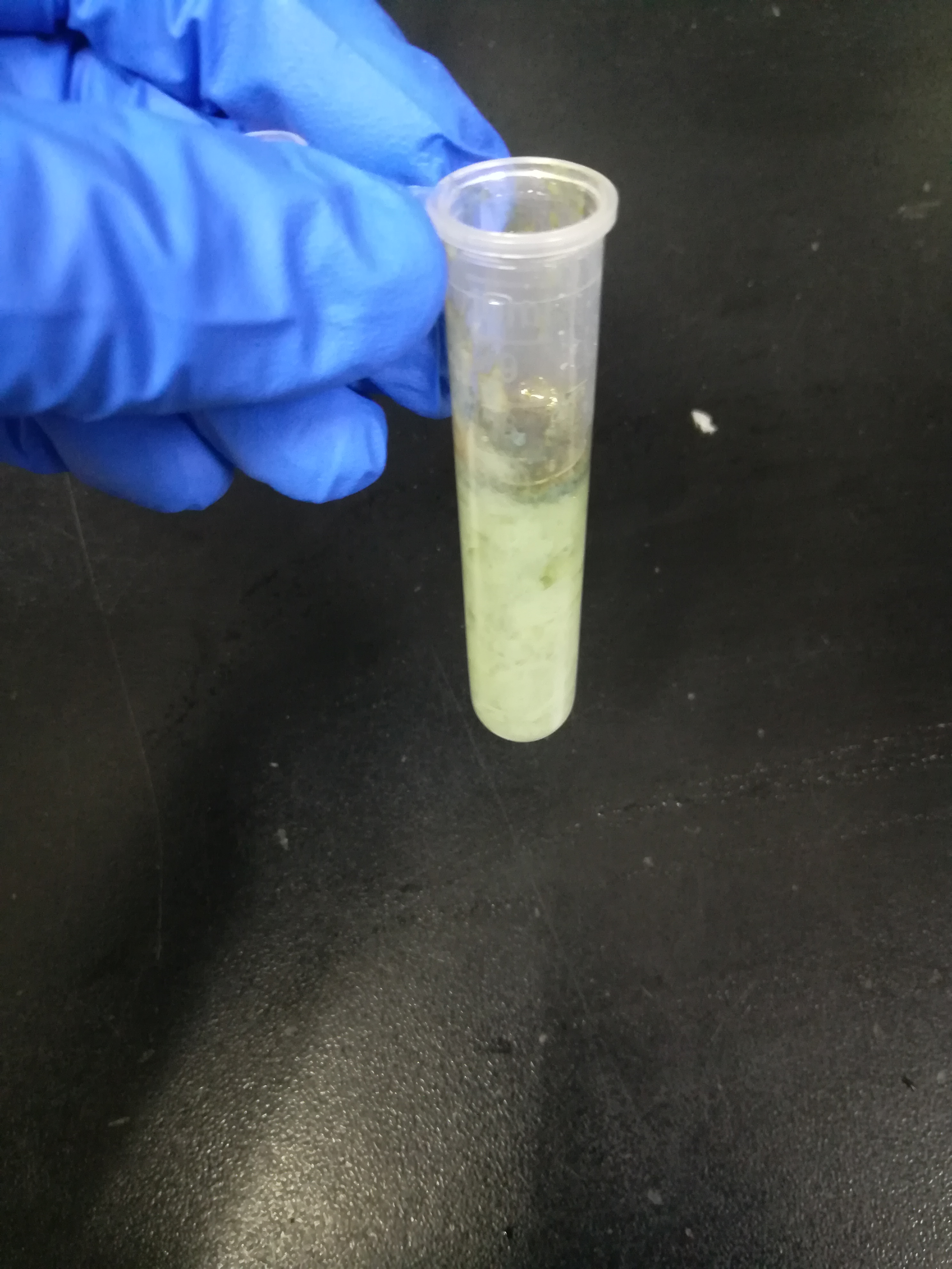 中文（中国大陆）: FeSO4和NaOH反应，生成浅色的沉淀（绿锈）